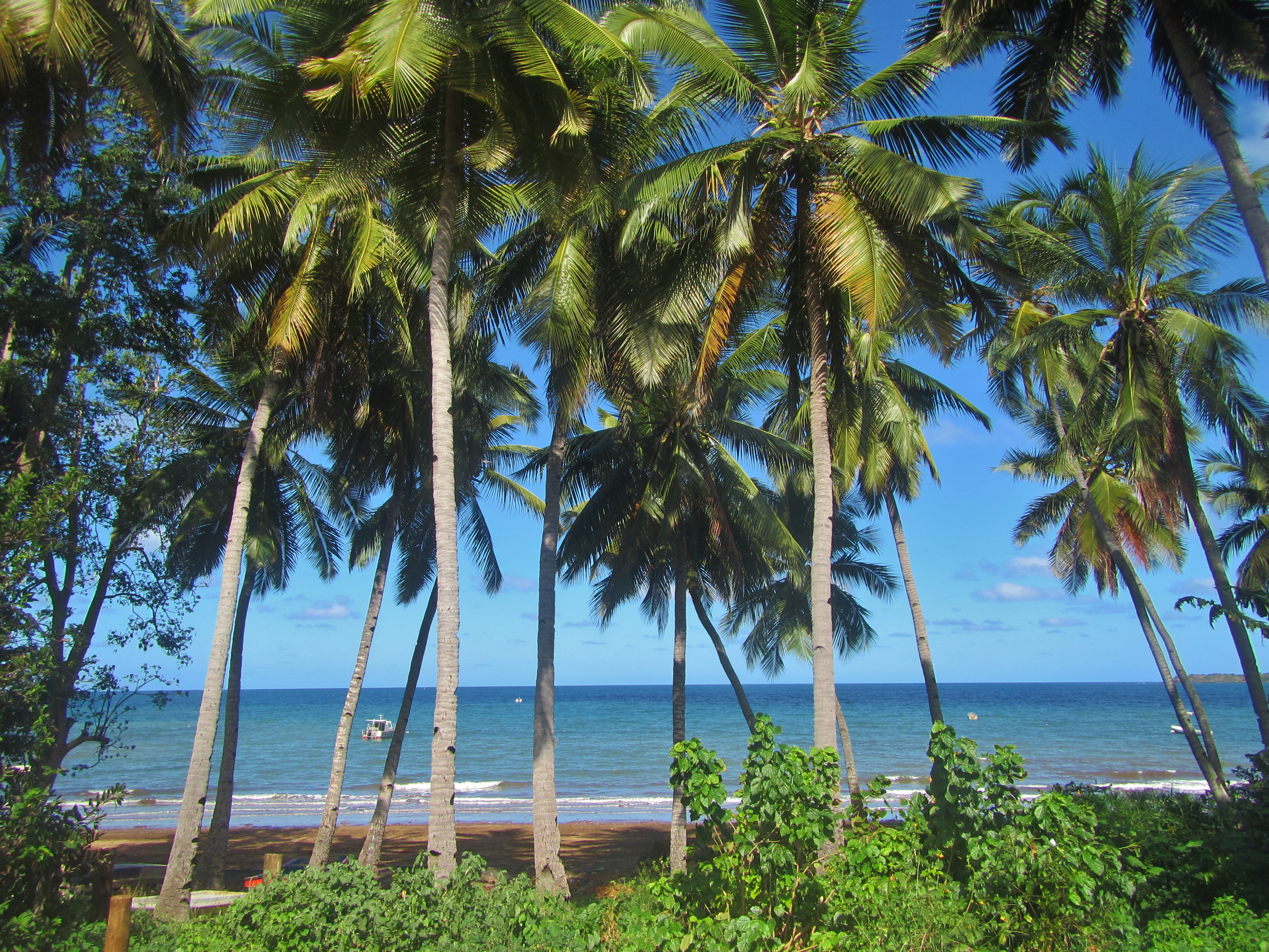 Vue de la plage de Nyambadao (commune de Bandrélé), à Mayotte.